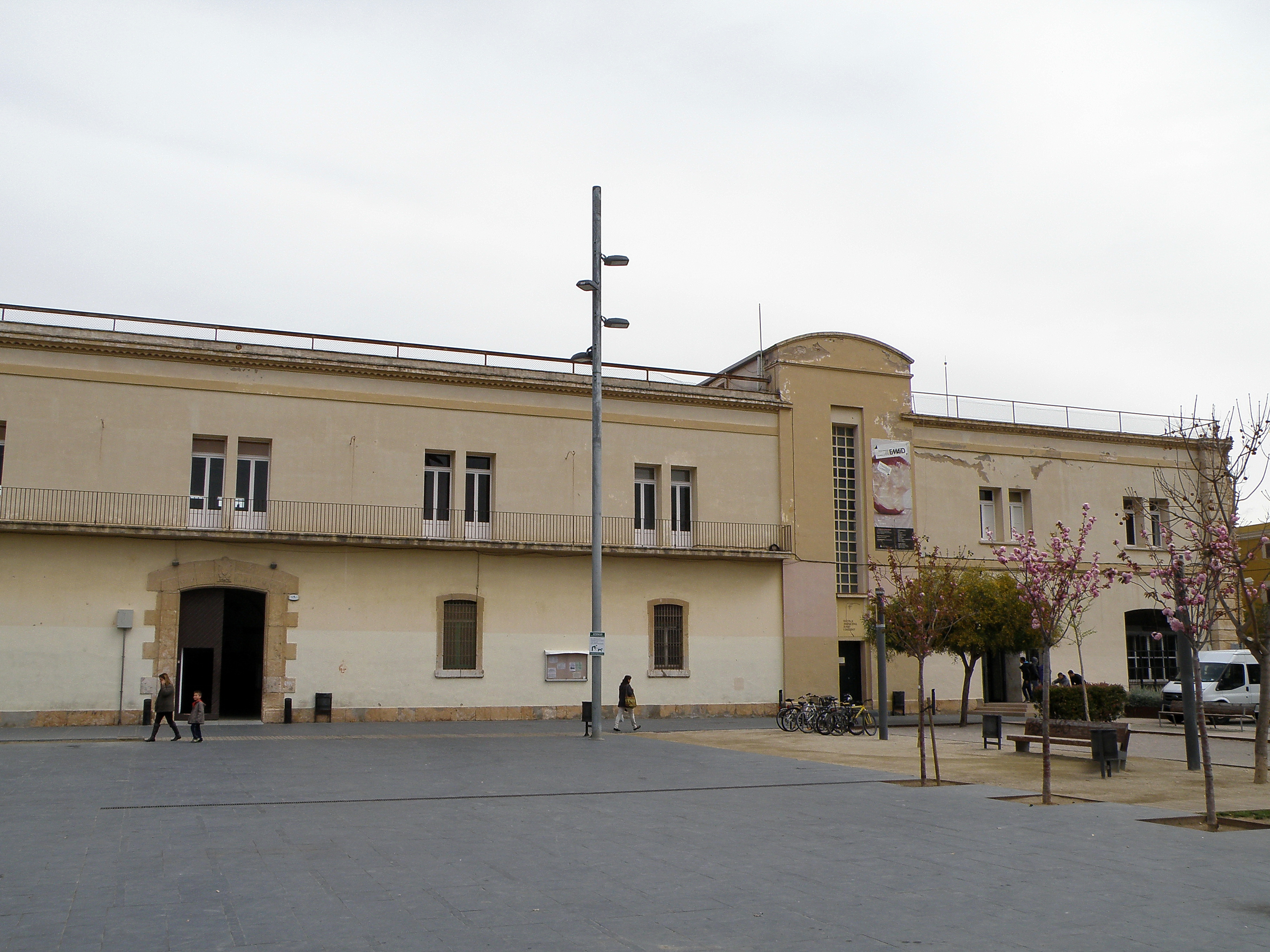 Les Casernes de Vilanova i la Geltrú, actualment la seu del Club Patí Vilanova (fundat l'any 1951) i l'Escola Municipal d'Art i Disseny